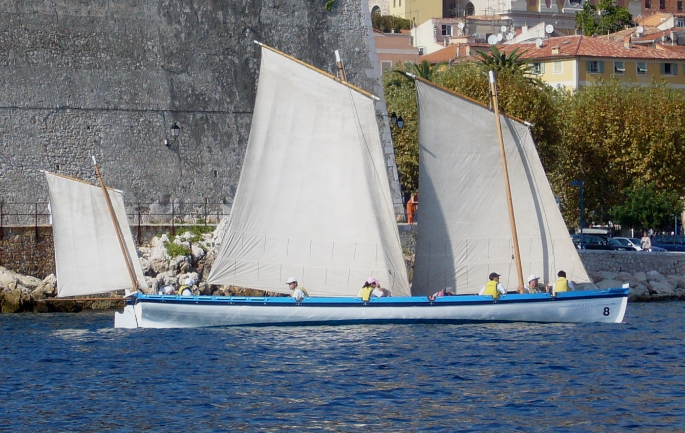 Massalia, la yole de Marseille, lors des Rencontres des yoles de Bantry de Méditerranée, Villefranche-sur-Mer, octobre 2009